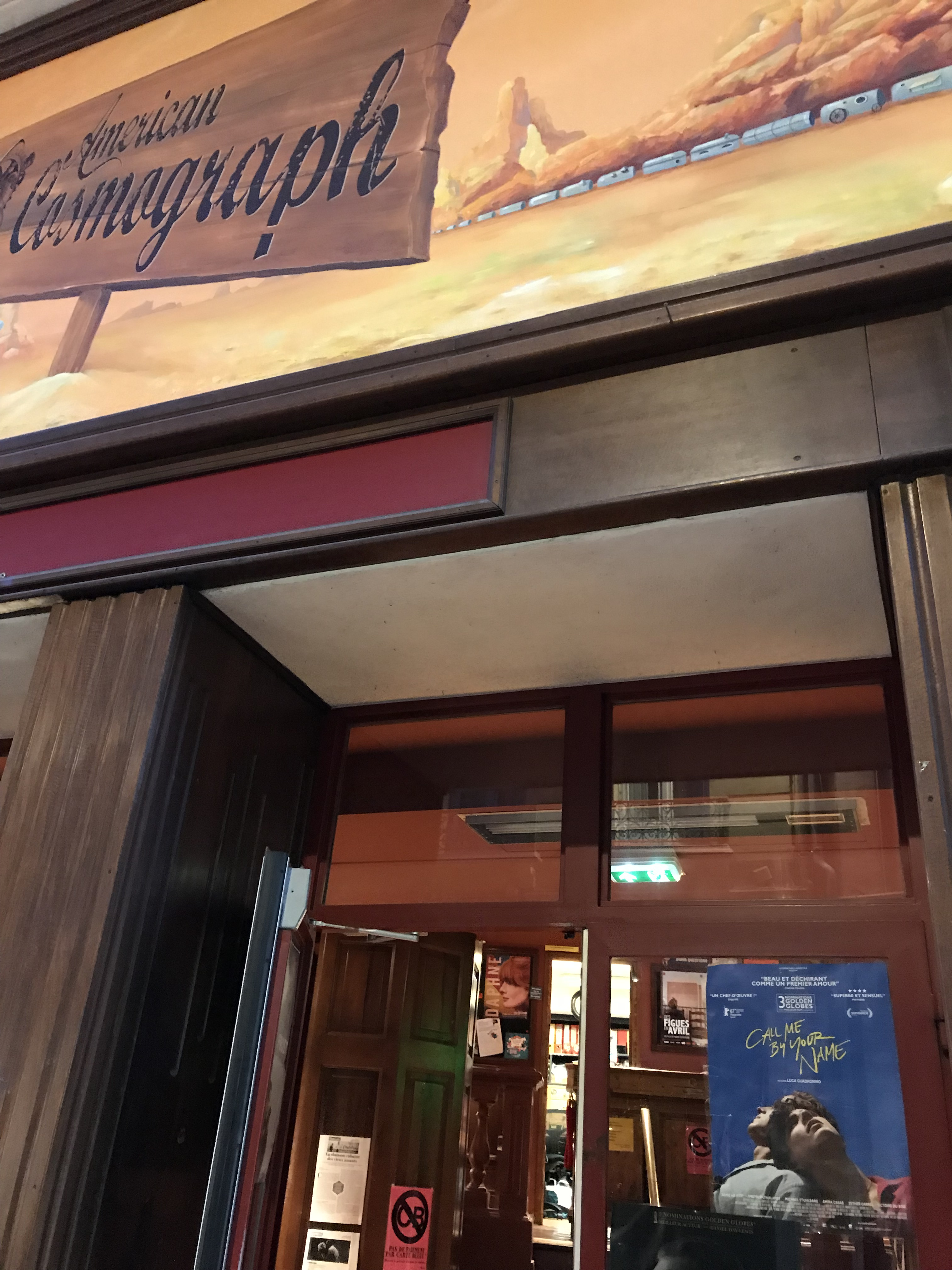 Projection du film Call Me by Your Name au cinéma American Cosmograph de Toulouse (Haute-Garonne, France), en avril 2018.